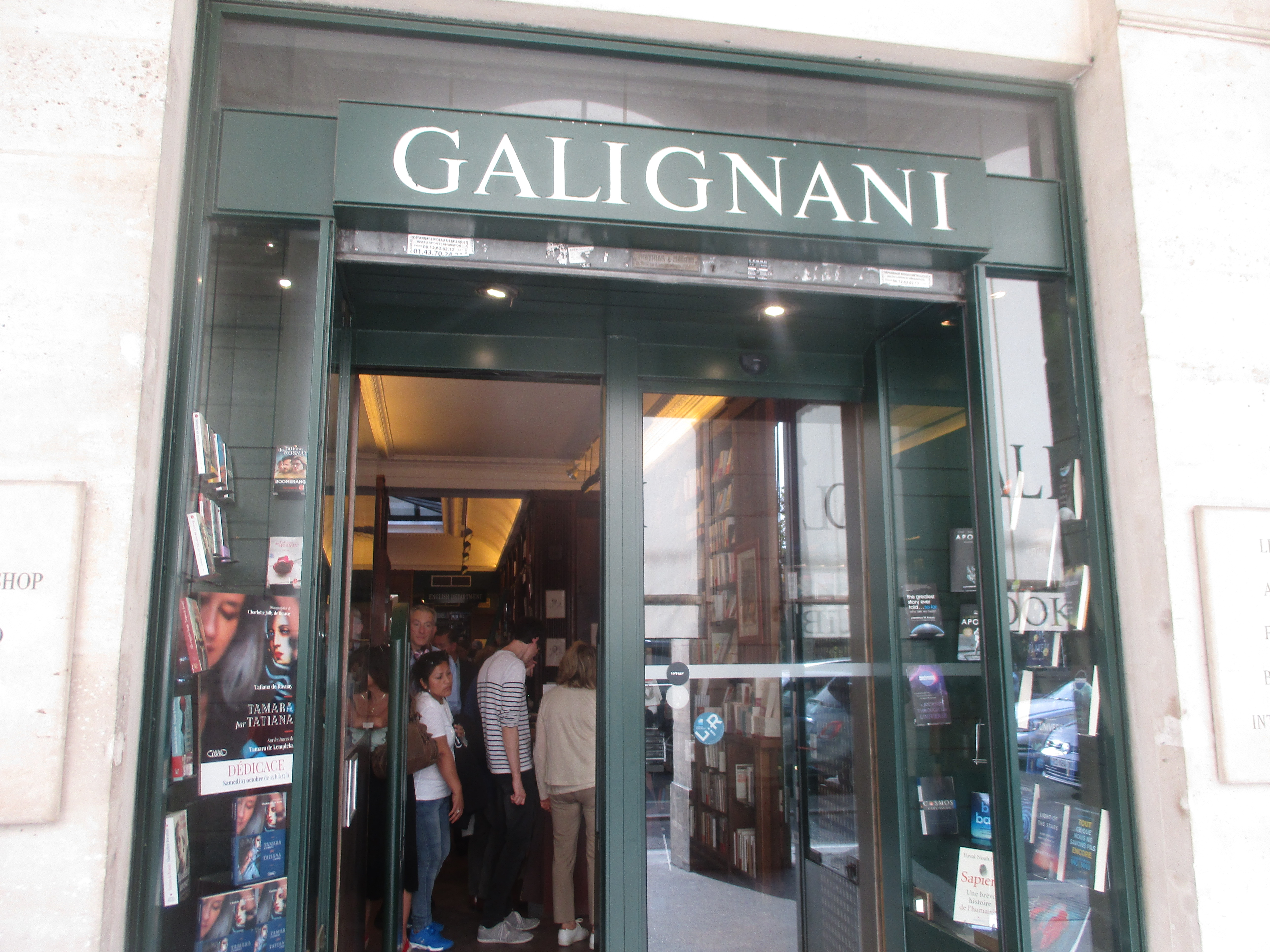 Entrée de la librairie Galignani, 224 rue de Rivoli, Paris.